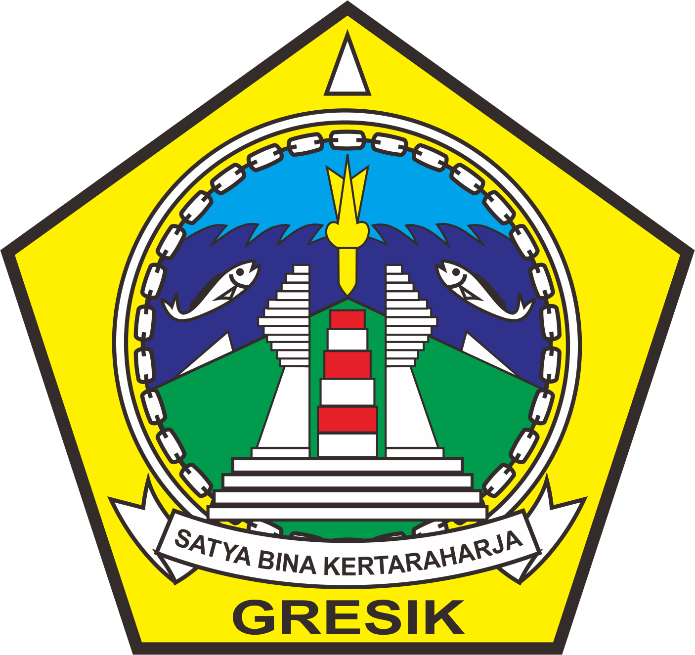 Lambang Kabupaten Gresik Licensing Gresik